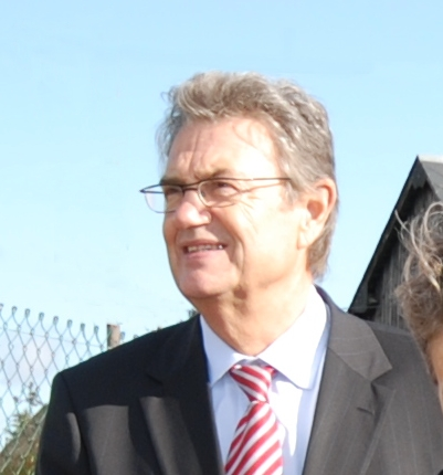 Gérard Cornu à Méréglise en Octobre 2009